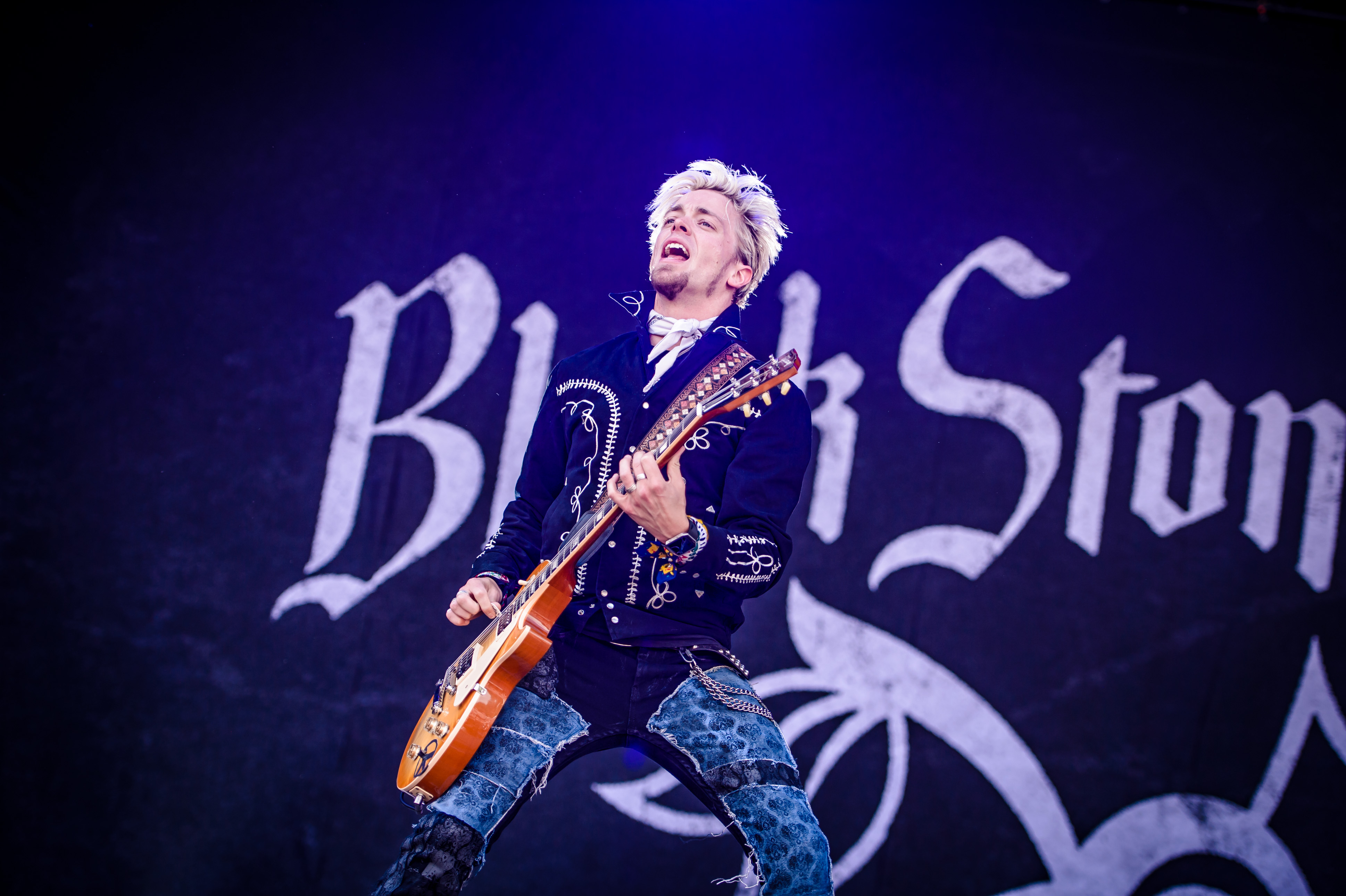 'Rock im Park 2018; Zeppelinfeld Nürnberg': 'Black Stone Cherry'